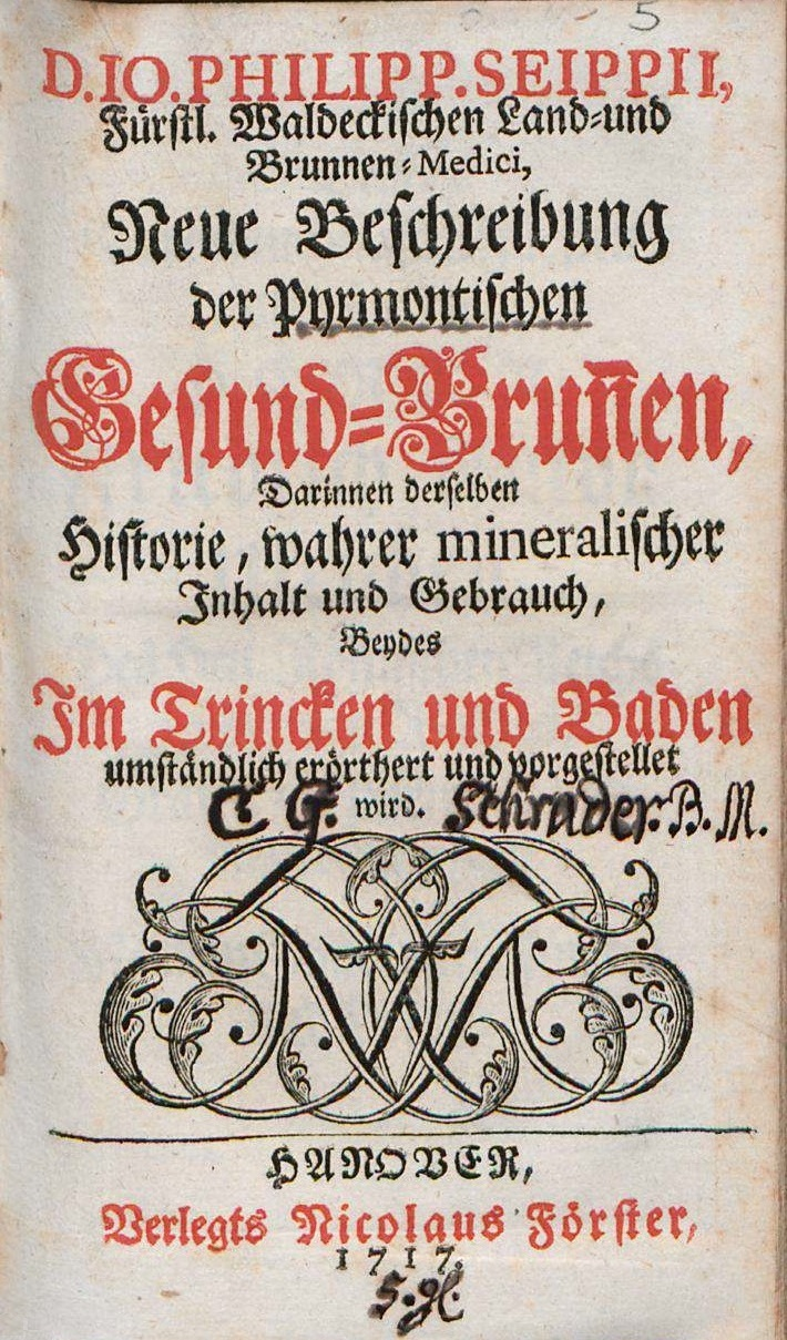 Johann Philipp Seip: Neue Beschreibung der Pyrmontischen Gesund-Brunnen, Hannover 1717, Titelseite